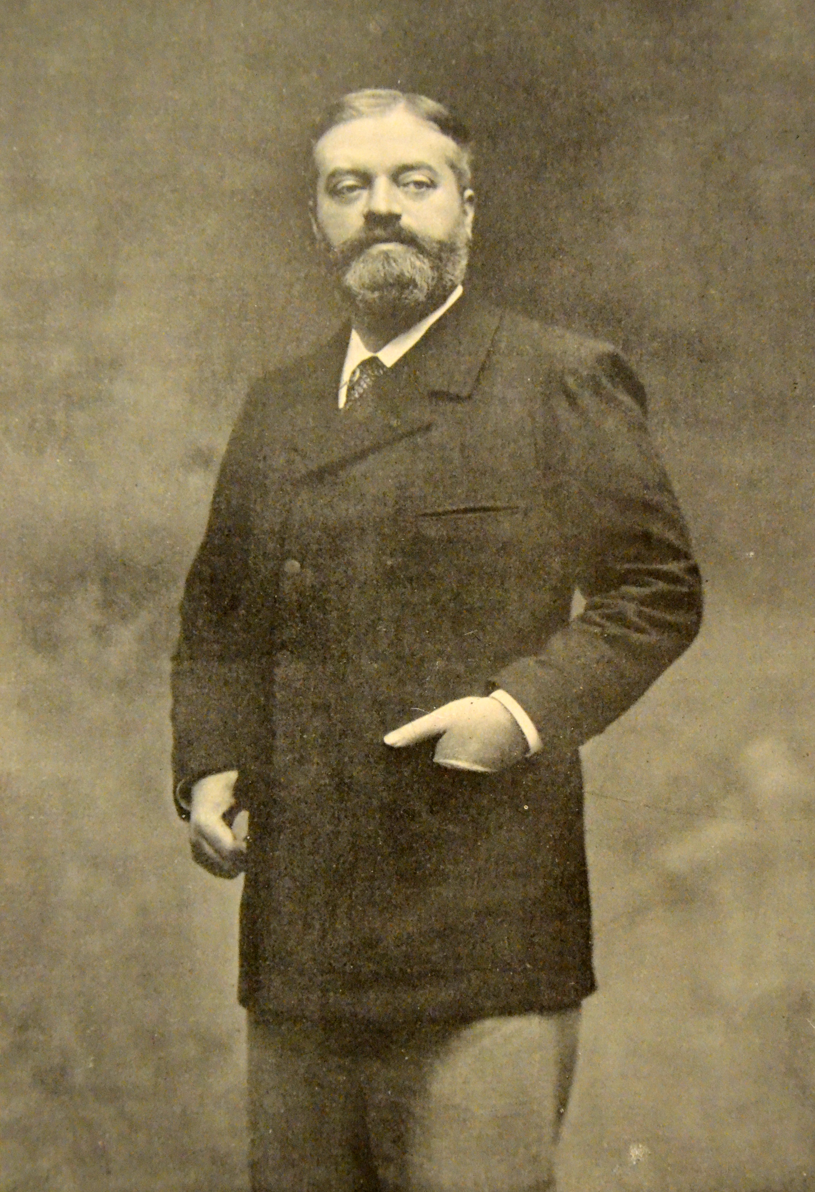 Photo légendée "HP Nénot" pour Henri-Paul Nénot), membre de l'Institut", dans un article de la "Revue illustrée" (Tome relié 1902)